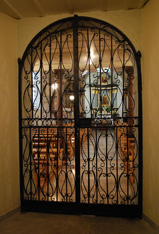 Magnifique porte d'entrée en fer forgé, Arconciel, canton Fribourg.